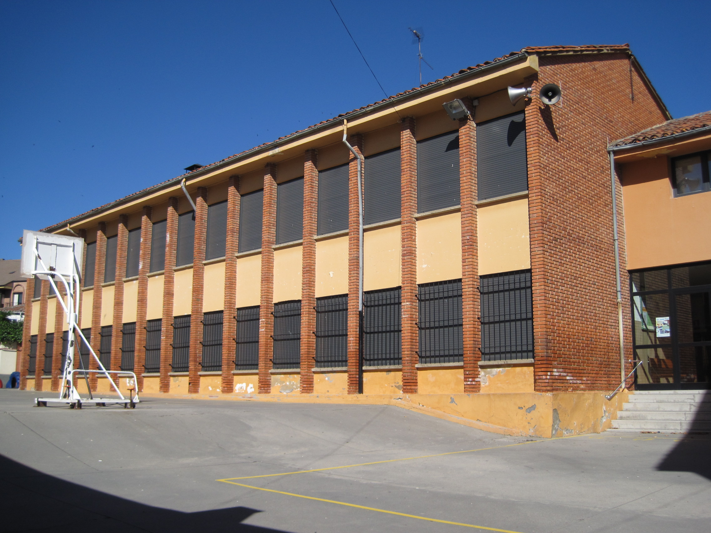 Vista parcial del colegio Santa Marta, en Astorga (España).